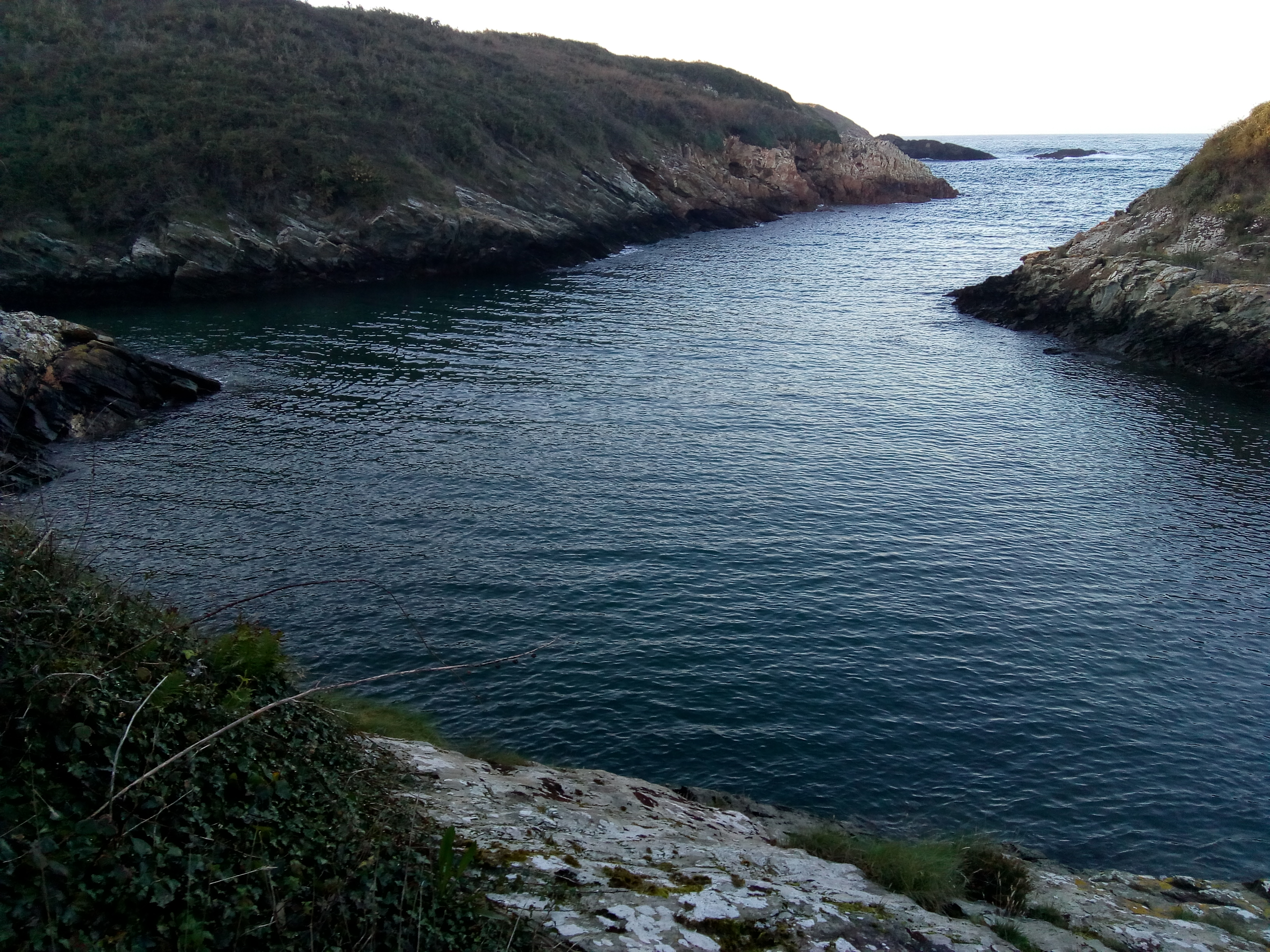 Desembocadura do río de Vilaselán (Ribadeo) no mar Cantábrico